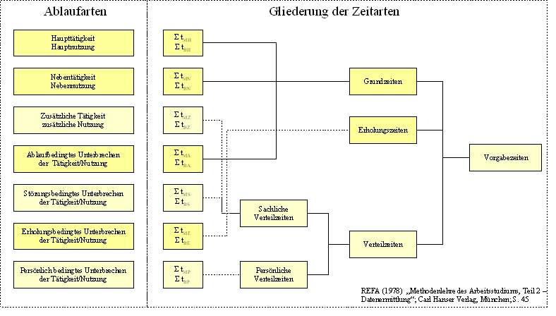 Gliederung der Zeitarten für Mensch/Betriebmittel